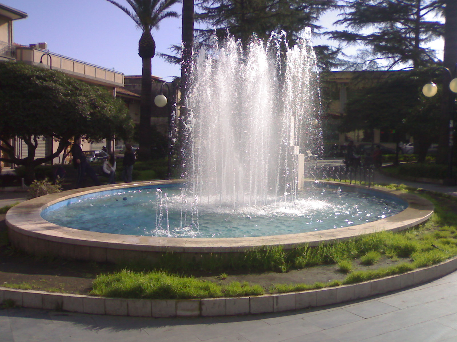 Fontana di Villa San Francesco, Giarre, Sicily, Italy; 2007